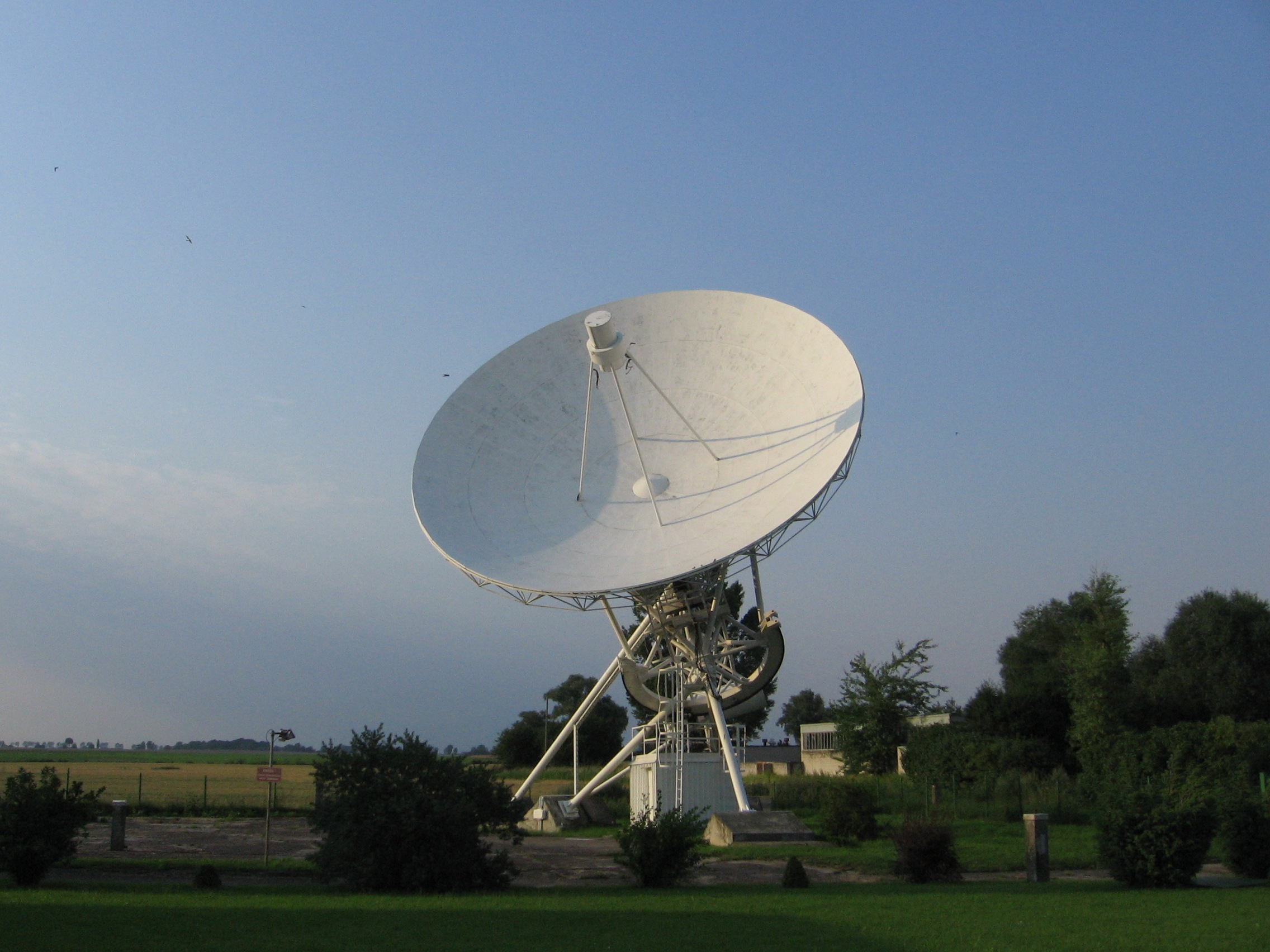 Toruń 15m radiotelescope